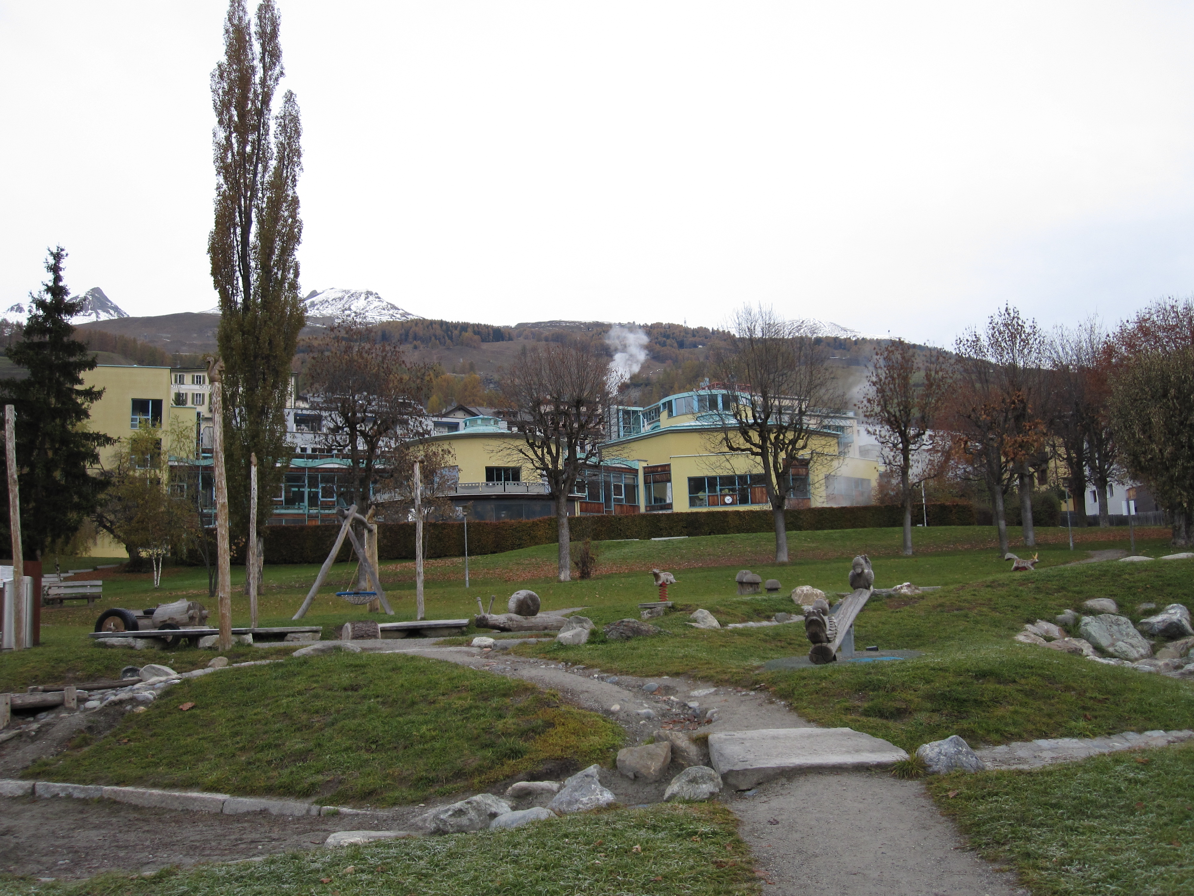 das Bogn Engiadina in Scuol (Unterengadin, Kanton Graubünden)